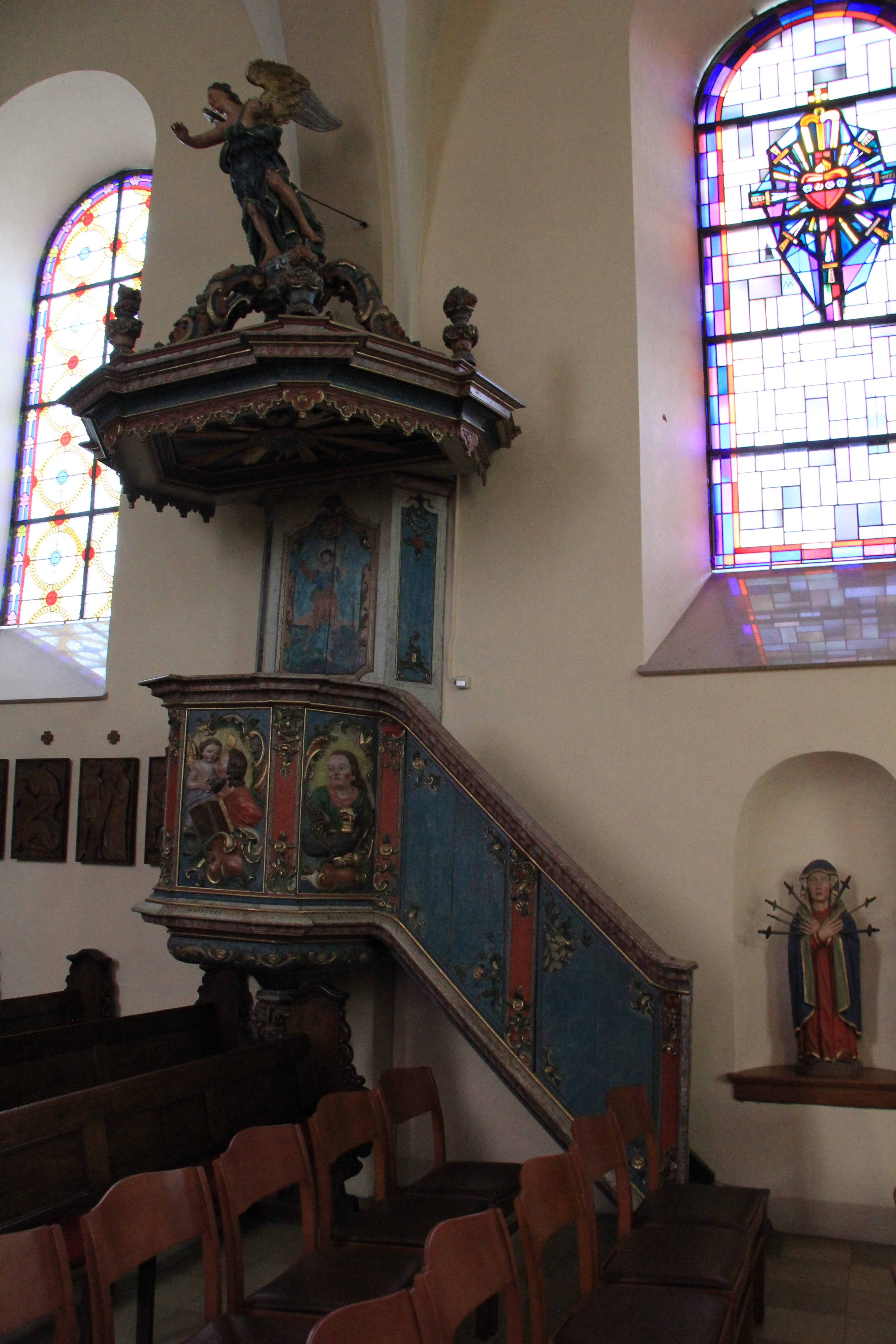 Den ale Priedegtstull an der Ielwener Parkierch (Gem. Biekerech).